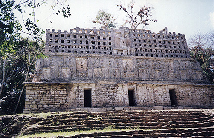 Templo Mayor in Yaxchilan, Chiapas, Mexiko